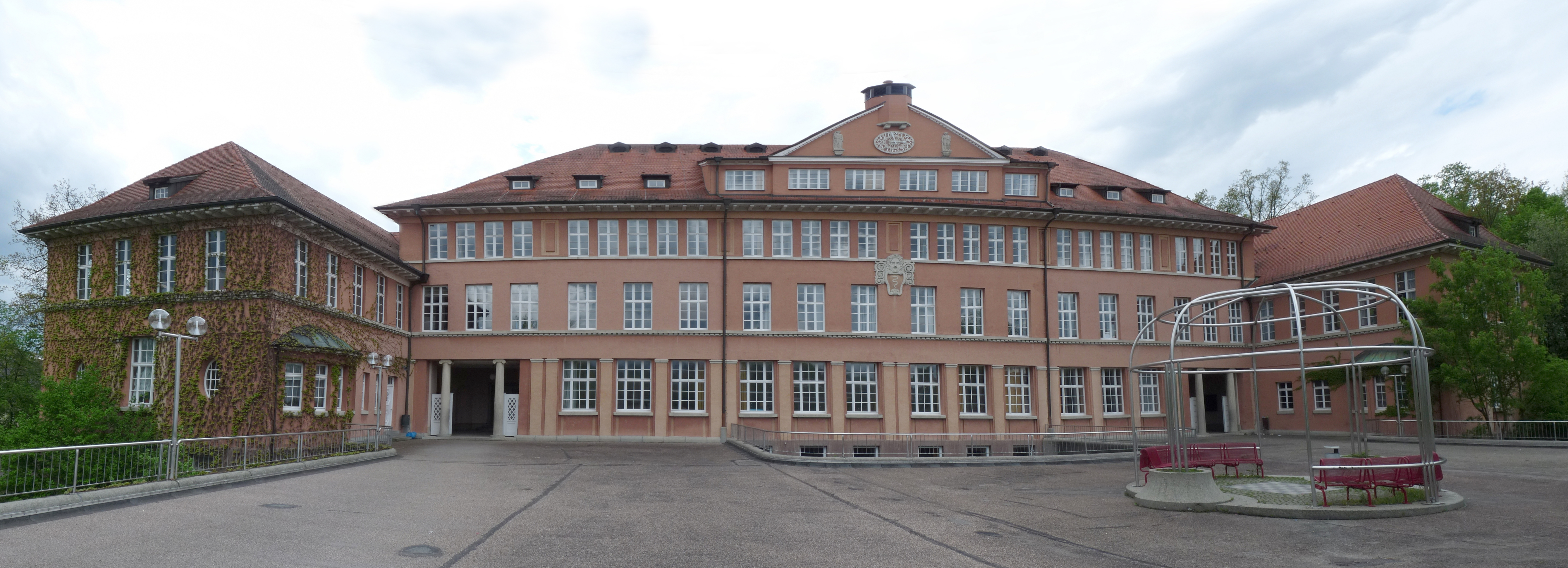 Schubart-Gymnasium Aalen